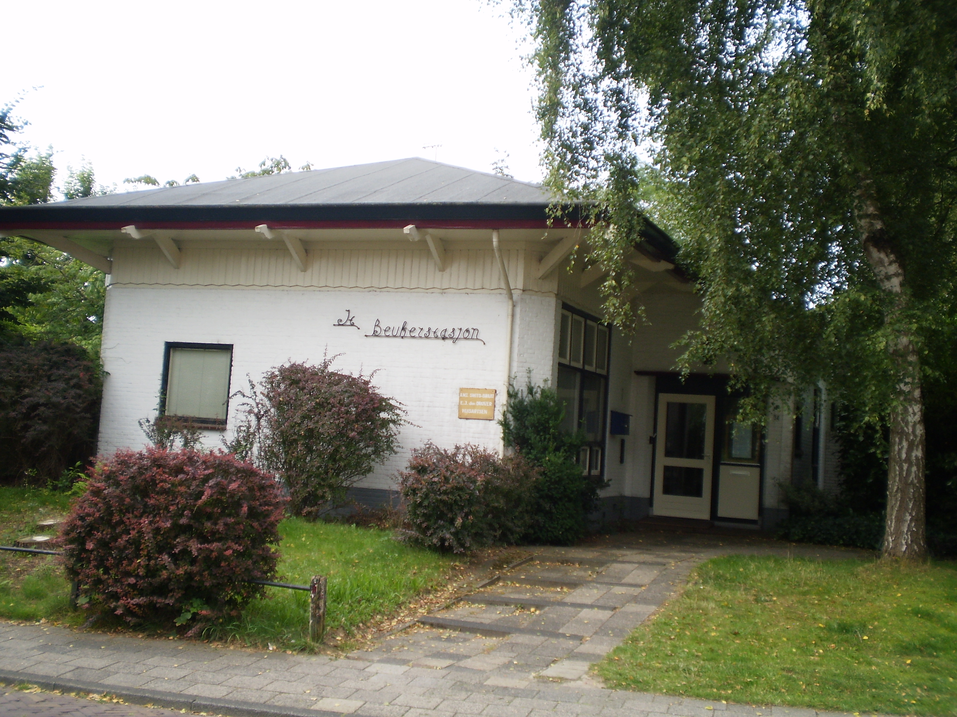 Ofbyld oanbean troch Swarte Kees op 30 july 2009